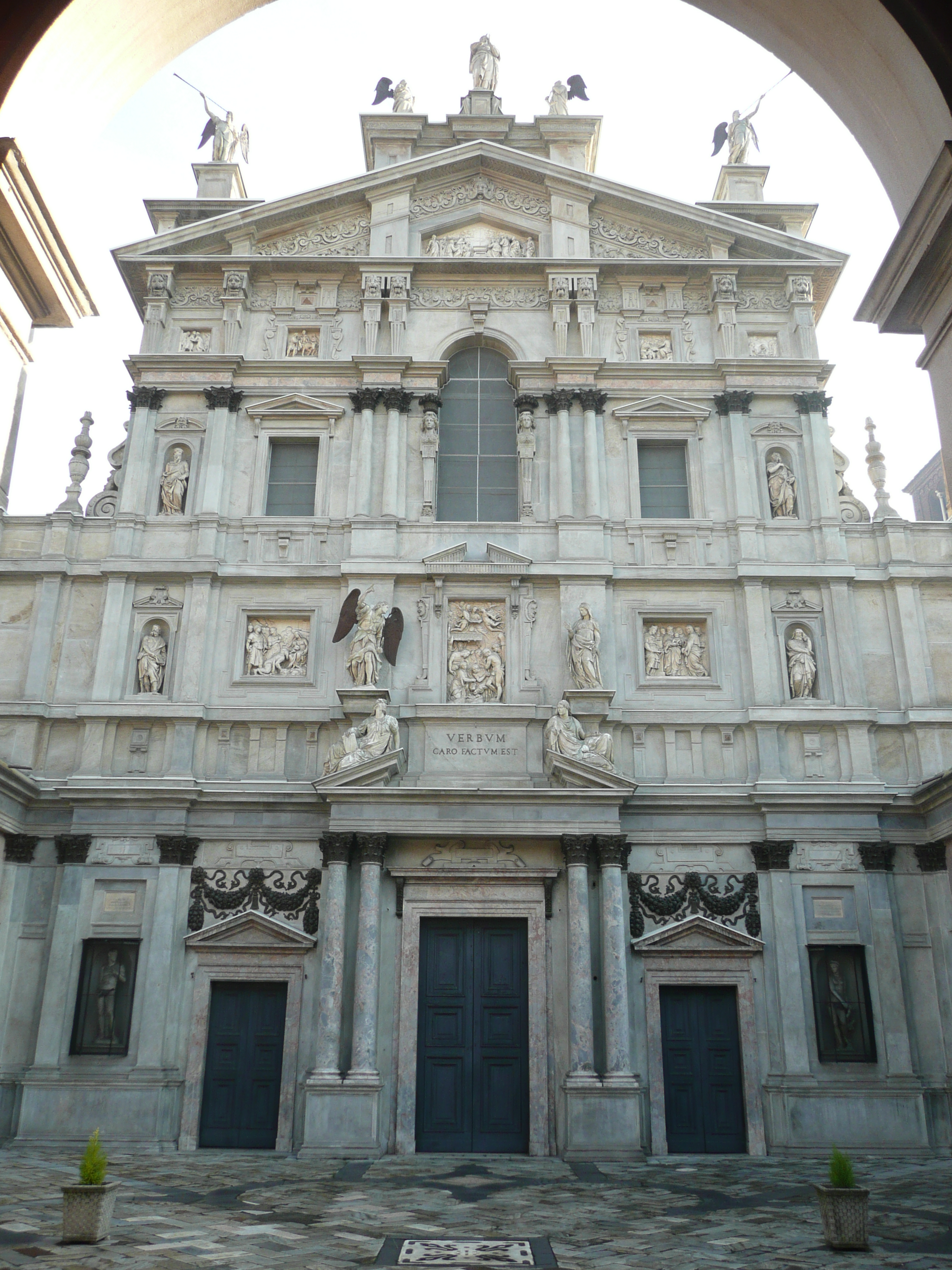 Santa Maria dei Miracoli presso San Celso, Milan; Facade, archtitect: Galaeazzo Alessi